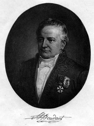 French geologist and mineralogist François Sulpice Beudant (1787-1850)